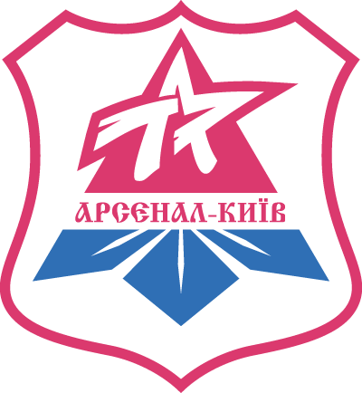 Стара емблема київського «Арсеналу»